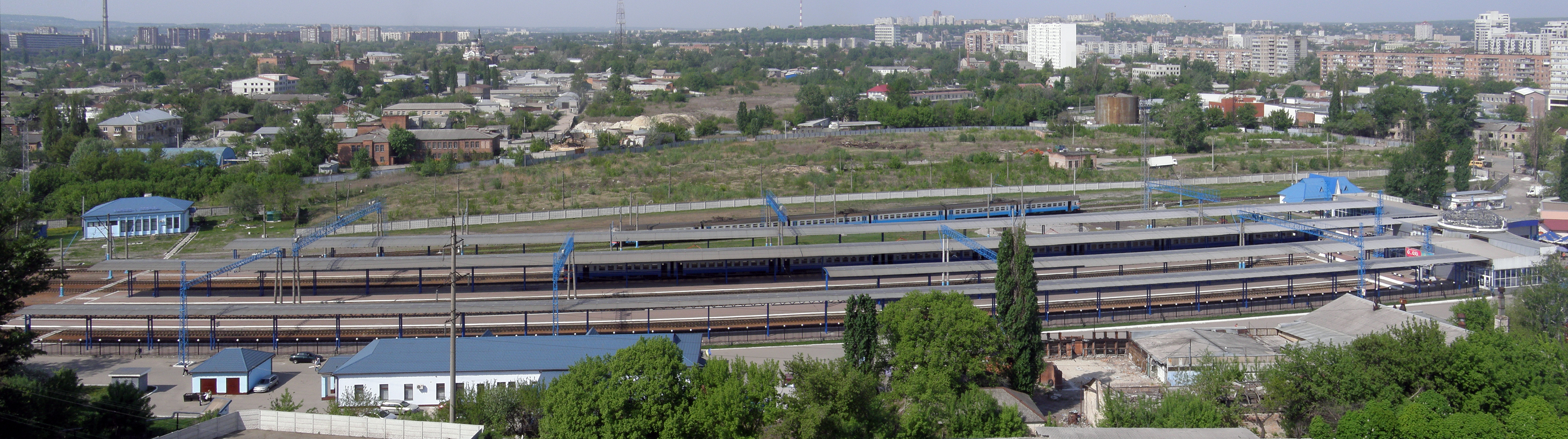 Харьков. Панорама района Левада и одноименной ж.д. станции.